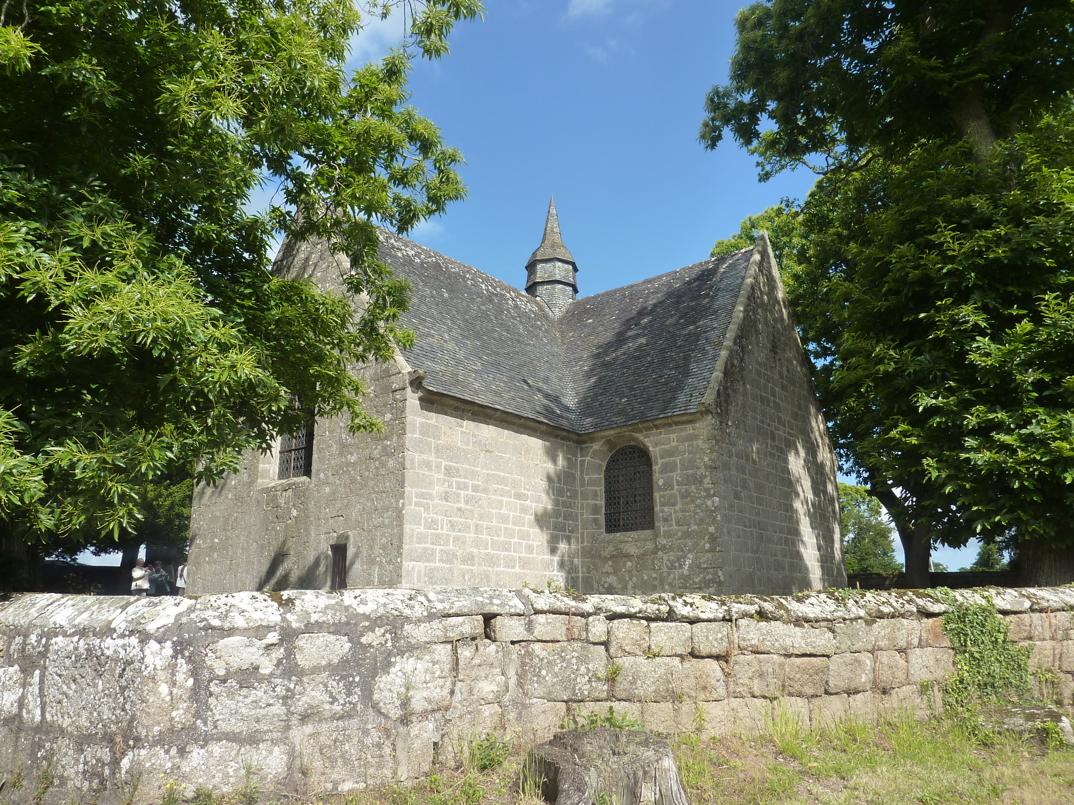 Sept-Saints (Vieux-Marché) : la chapelle vue de l'arrière